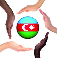 Année du multiculturalisme